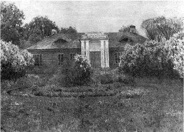 Беларуская (тарашкевіца): «Травень»